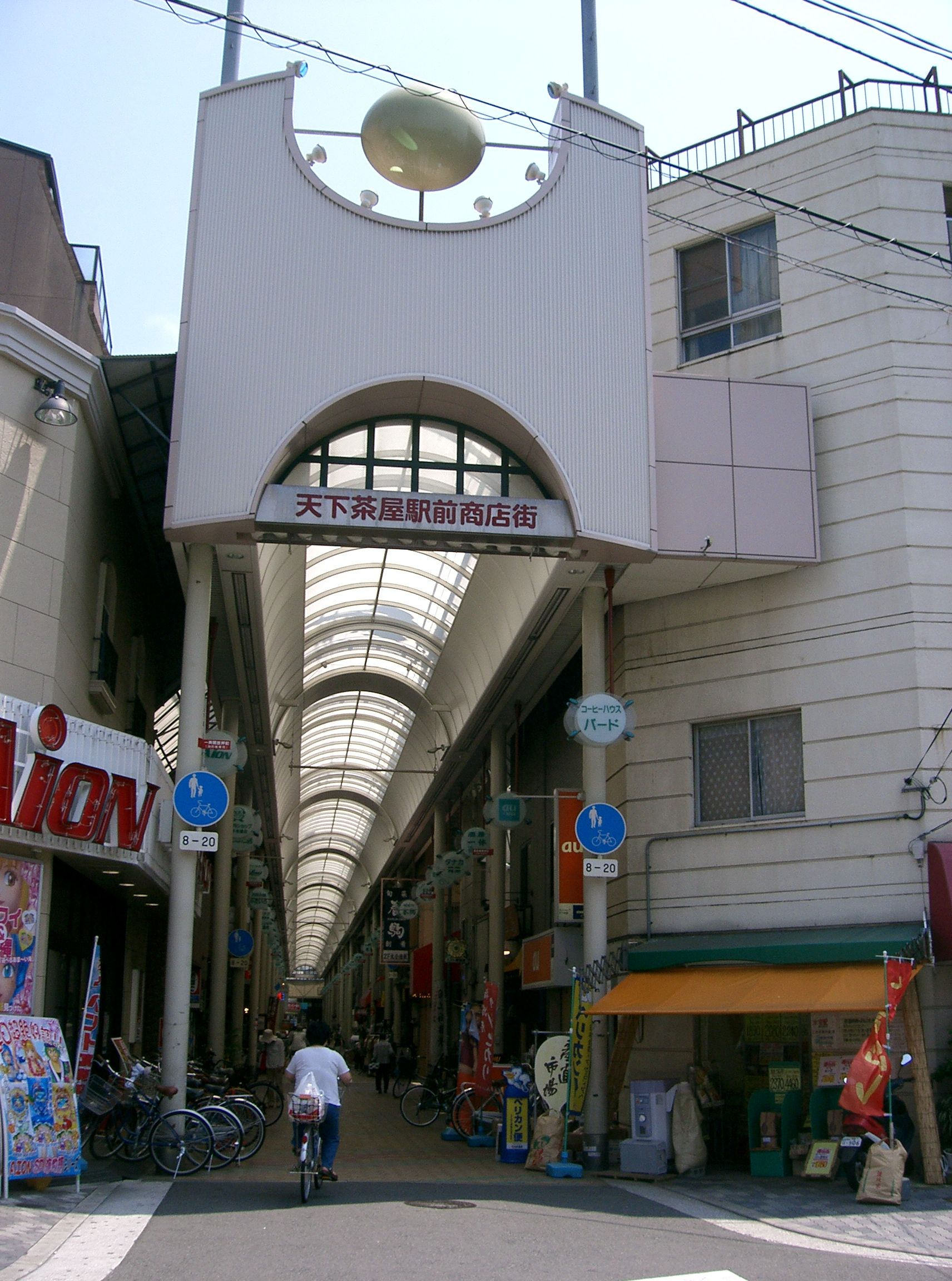 天下茶屋駅前商店街